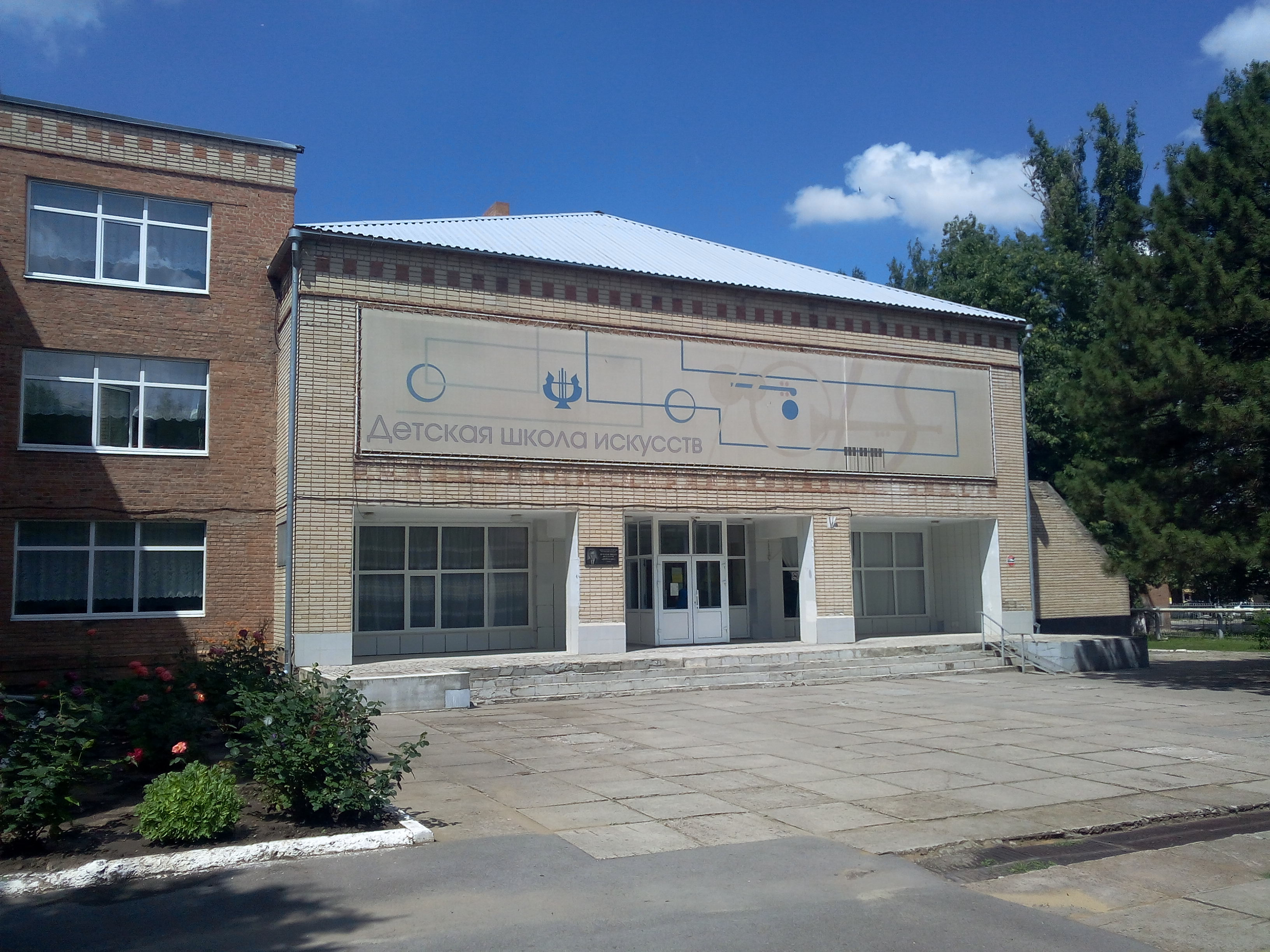 детская школа искусств №1 имени В.В. Еждика (г. Сальск)